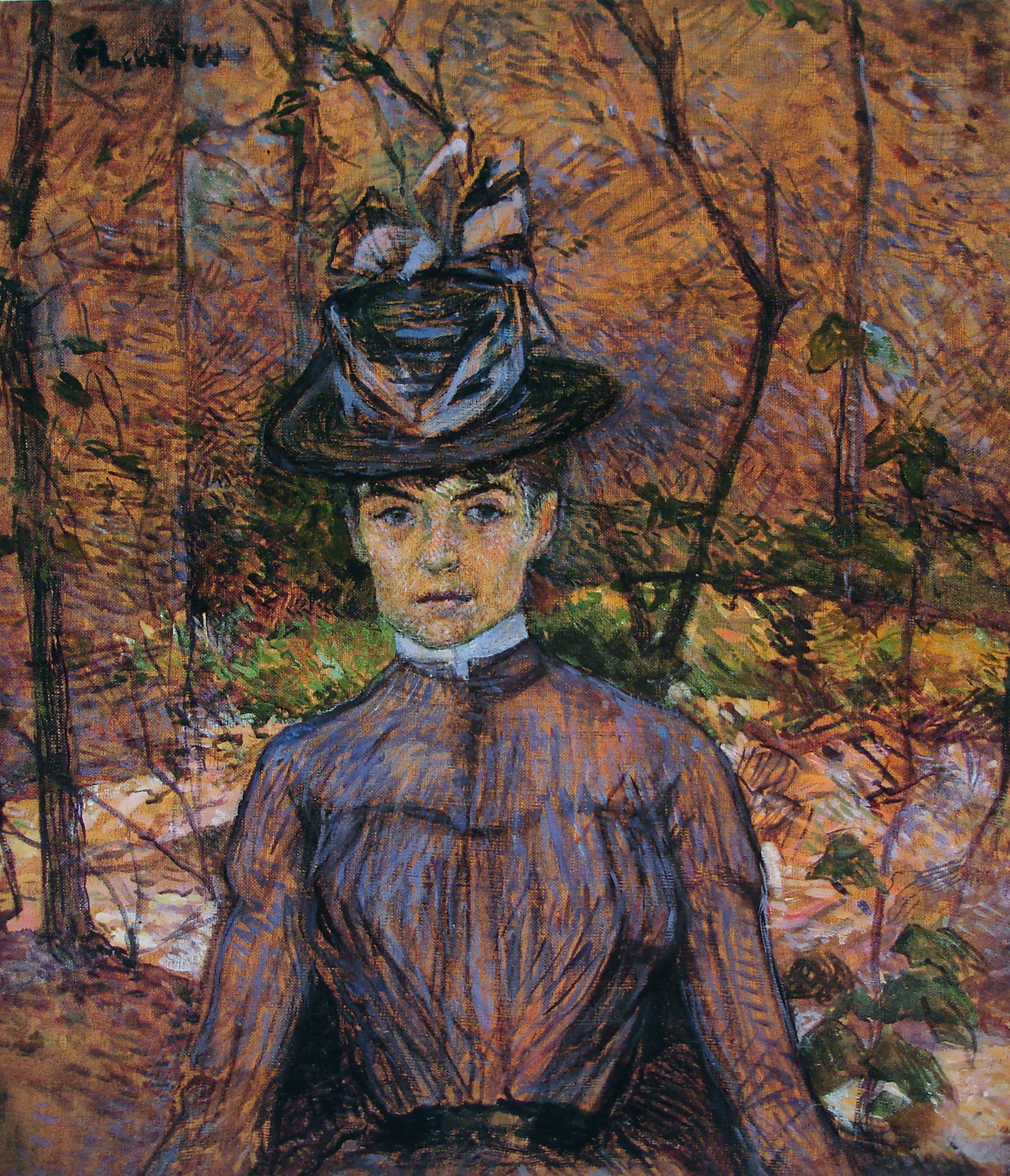 Portrait de Suzanne Valadon (Madame Suzanne Valadon, artiste peintre) (Retrato de Suzanne Valadon, pintora)